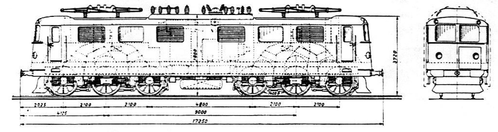 SNCF CC 6051 (CC 20001) Typenskizze